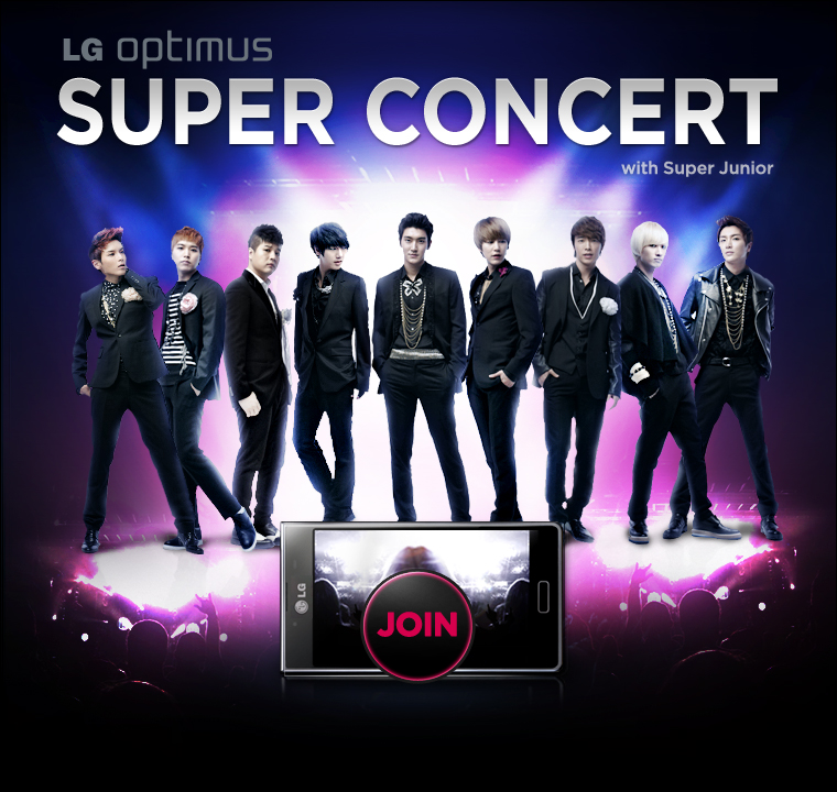 LG전자가 차별화된 스마트폰 새 디자인 ‘L-Style’시리즈의 아시아 모델로 유명 아이돌 그룹‘슈퍼주니어’를 선정했다.